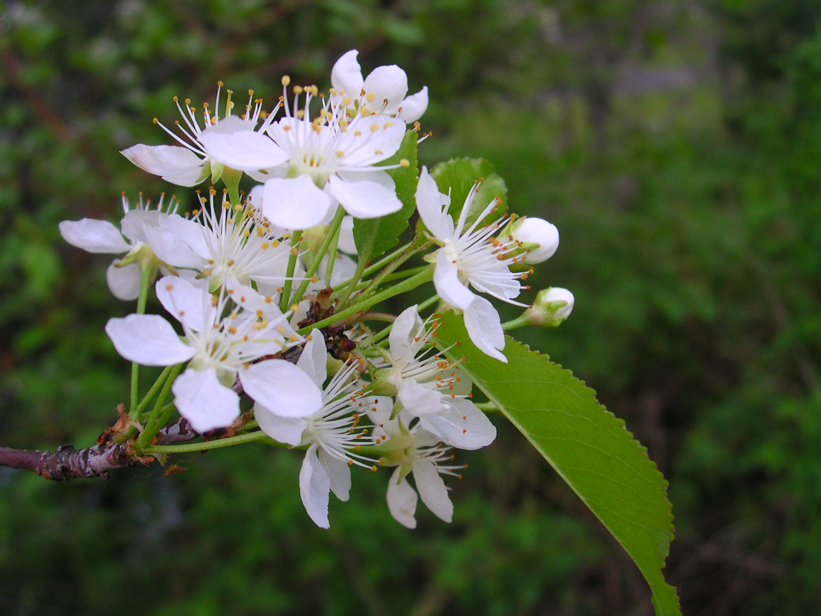 Prunus pennsylvanica 3